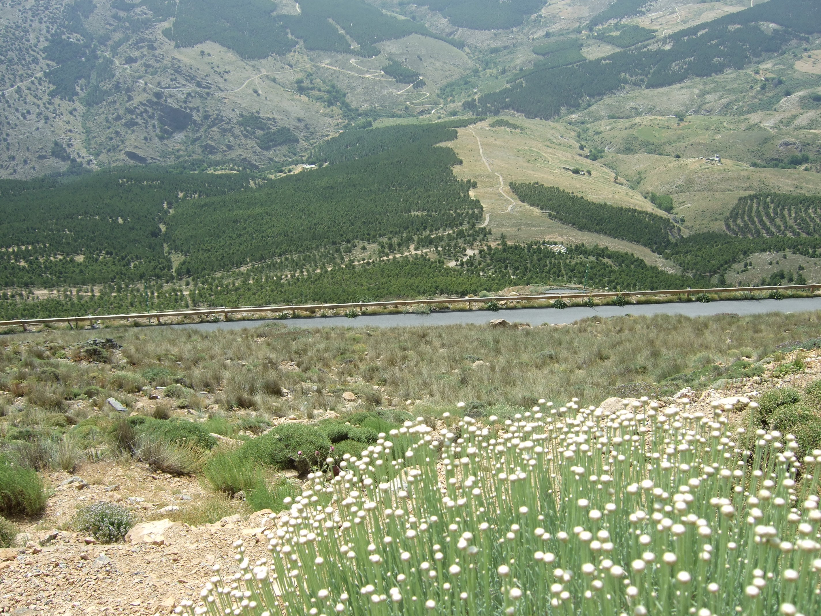 Corazón de Filabres